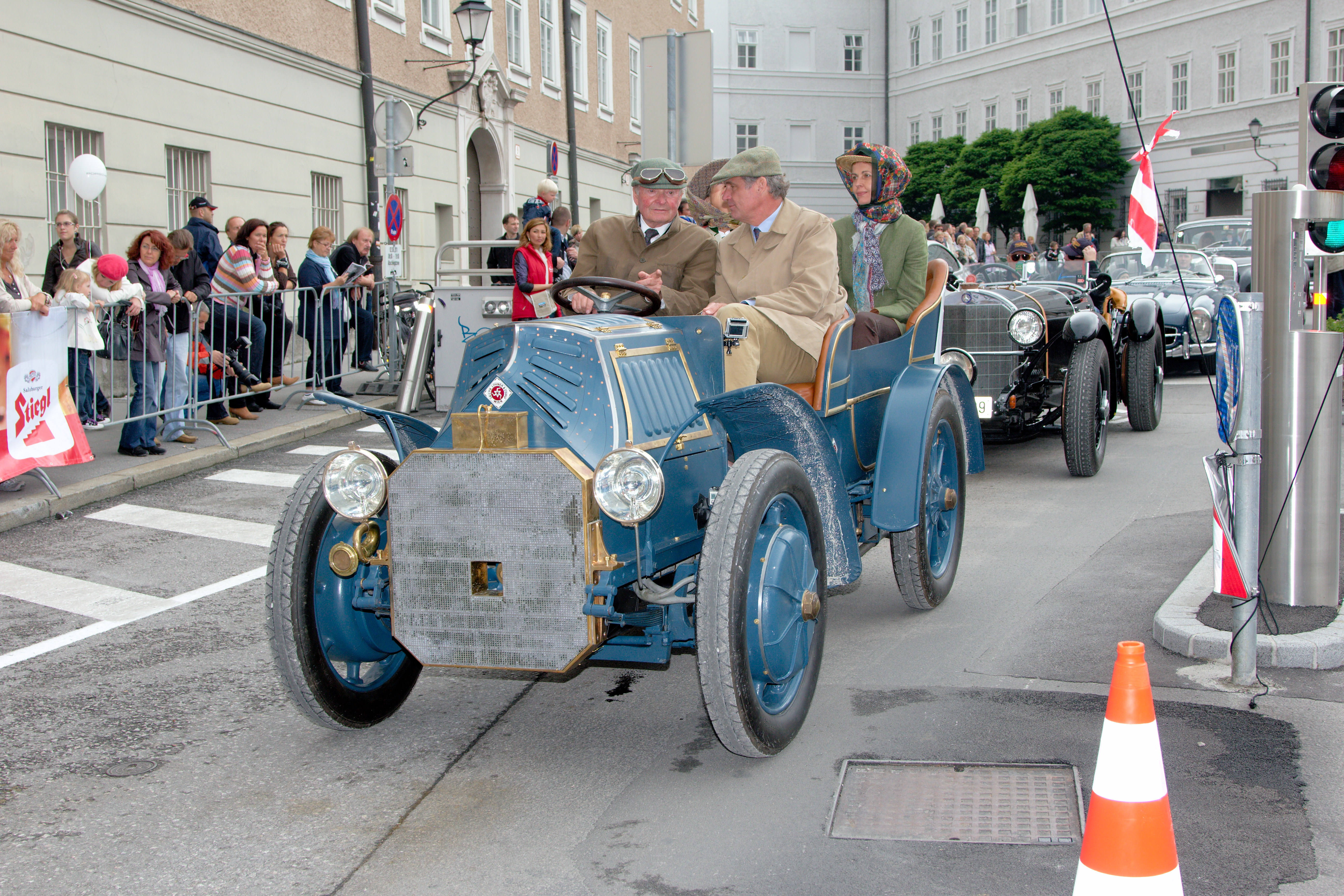 Lohnerporsche während des Gaisbergrennen 2011